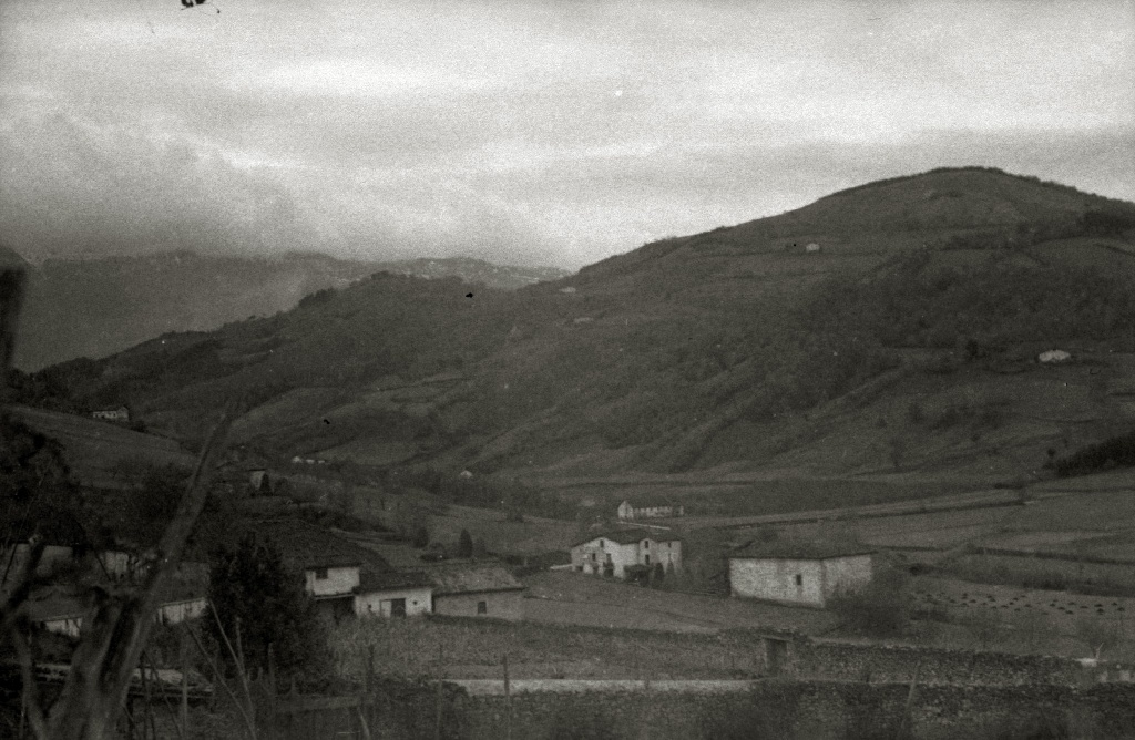 Título original: Vista de la localidad de Segura (2/2) Localización: Segura (Guipúzcoa)